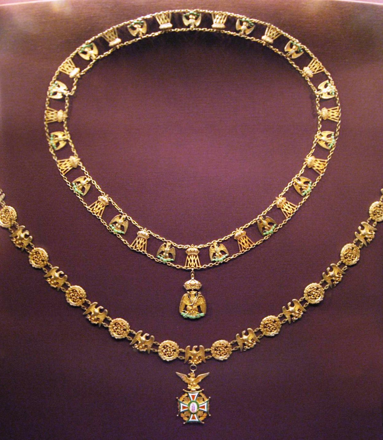 Außen: Collane des Ordens unserer Lieben Frau von Guadalupe. Wien (?), um 1864/1865. Silber vergoldet, teilweise emailiert. Inv. Nr. XIV IIb. Innen: Collane des mexikanischen Adlerordens. Wien, 1865. Silber vergoldet, teilweise emailiert. Inv. Nr. XIV IIa.